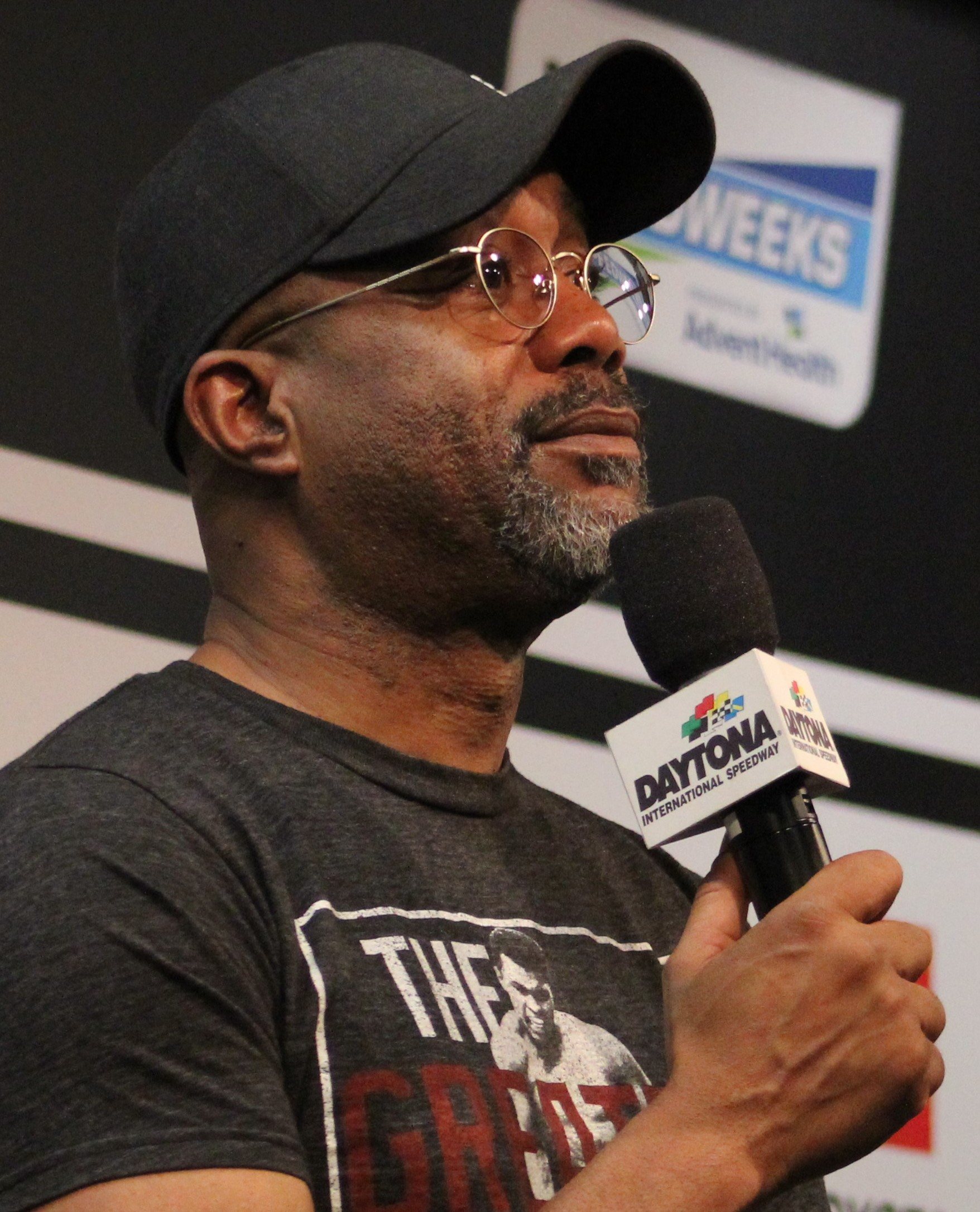 Daytona Speekweeks, 2020